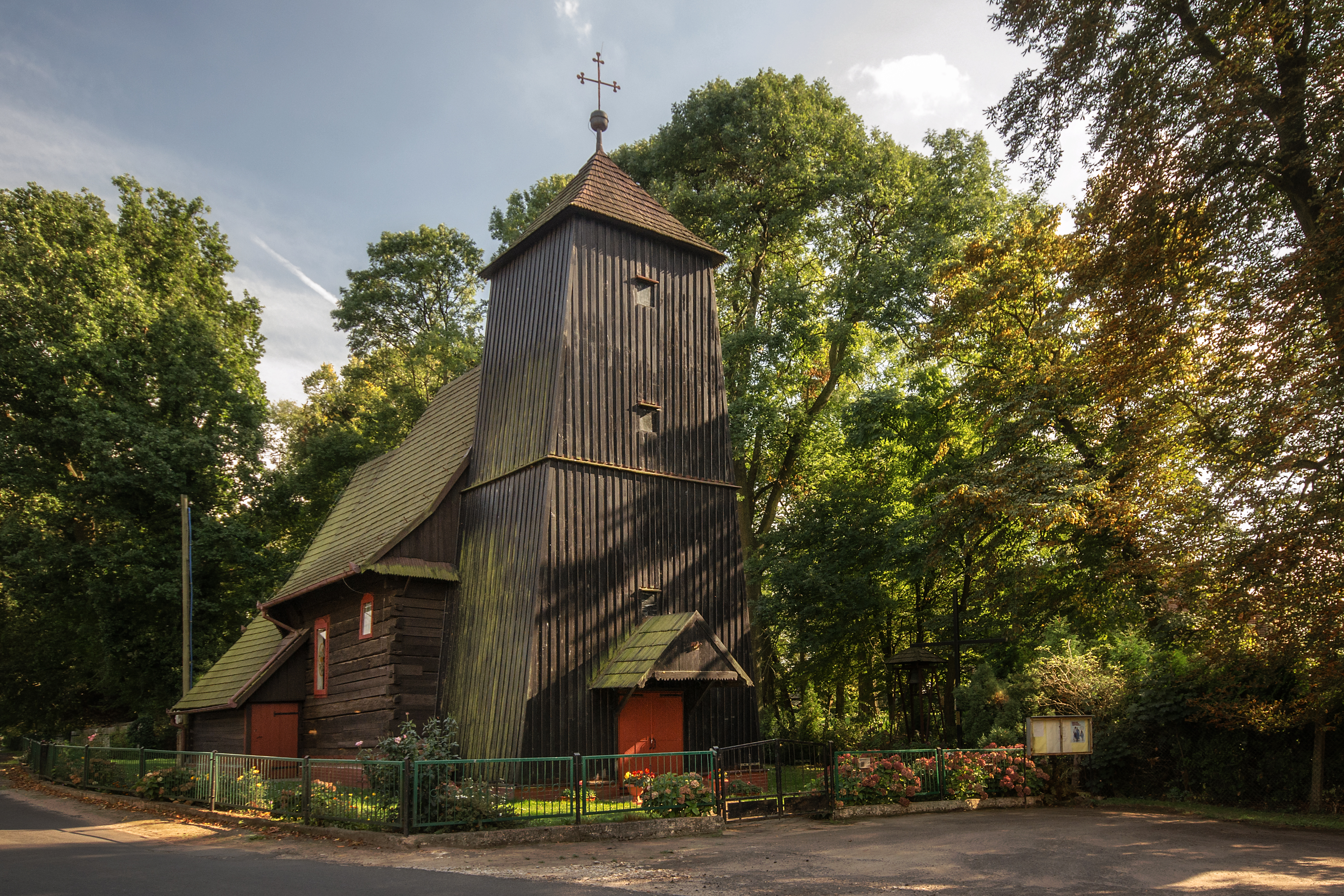 Świniary Wielkie, kościół fil. p.w. św. Bartłomieja, 1672